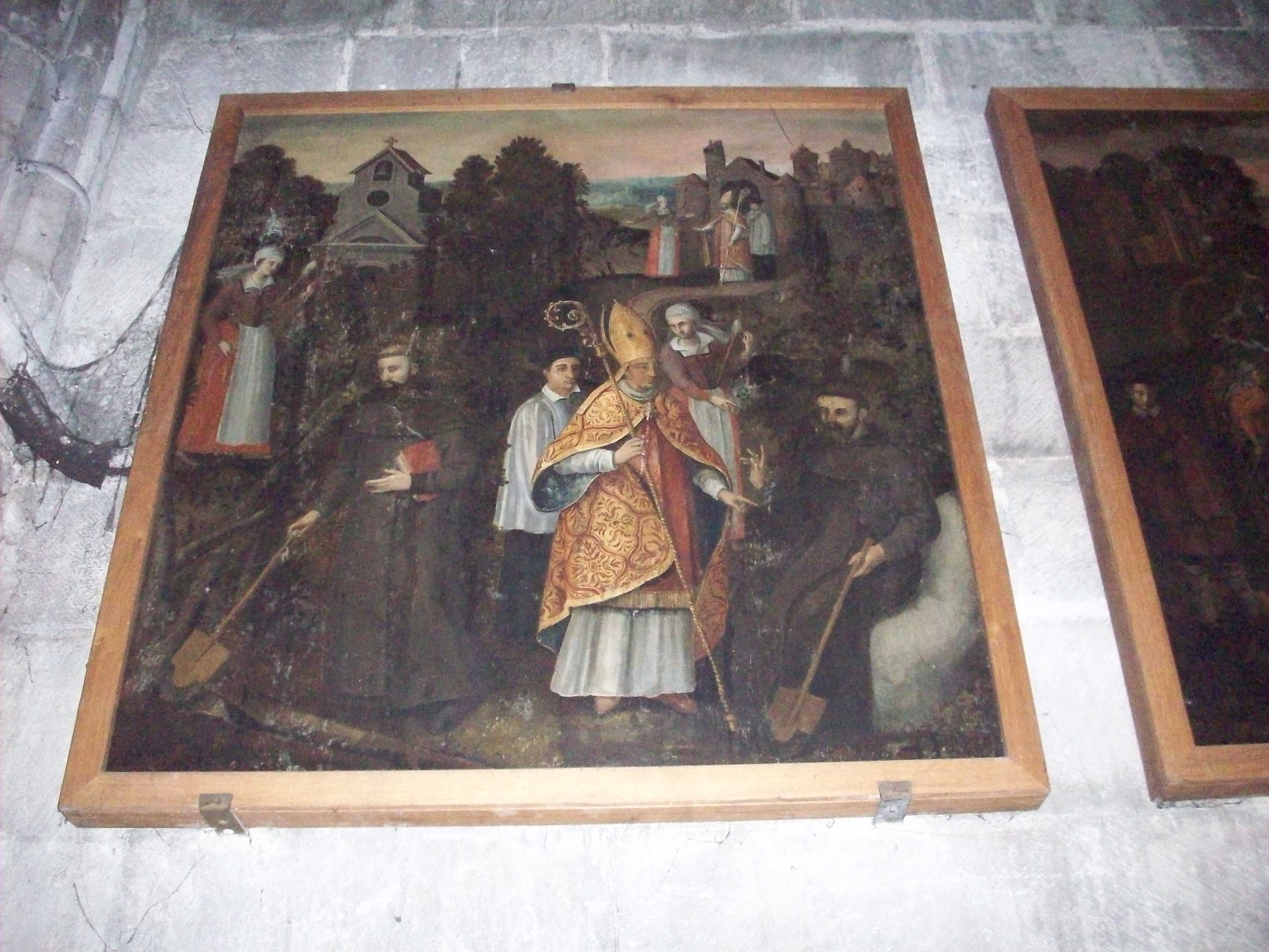 Tableau sur la vie de Saint Romain, du XVIe siècle, dans la chapelle du petit Saint Romain.